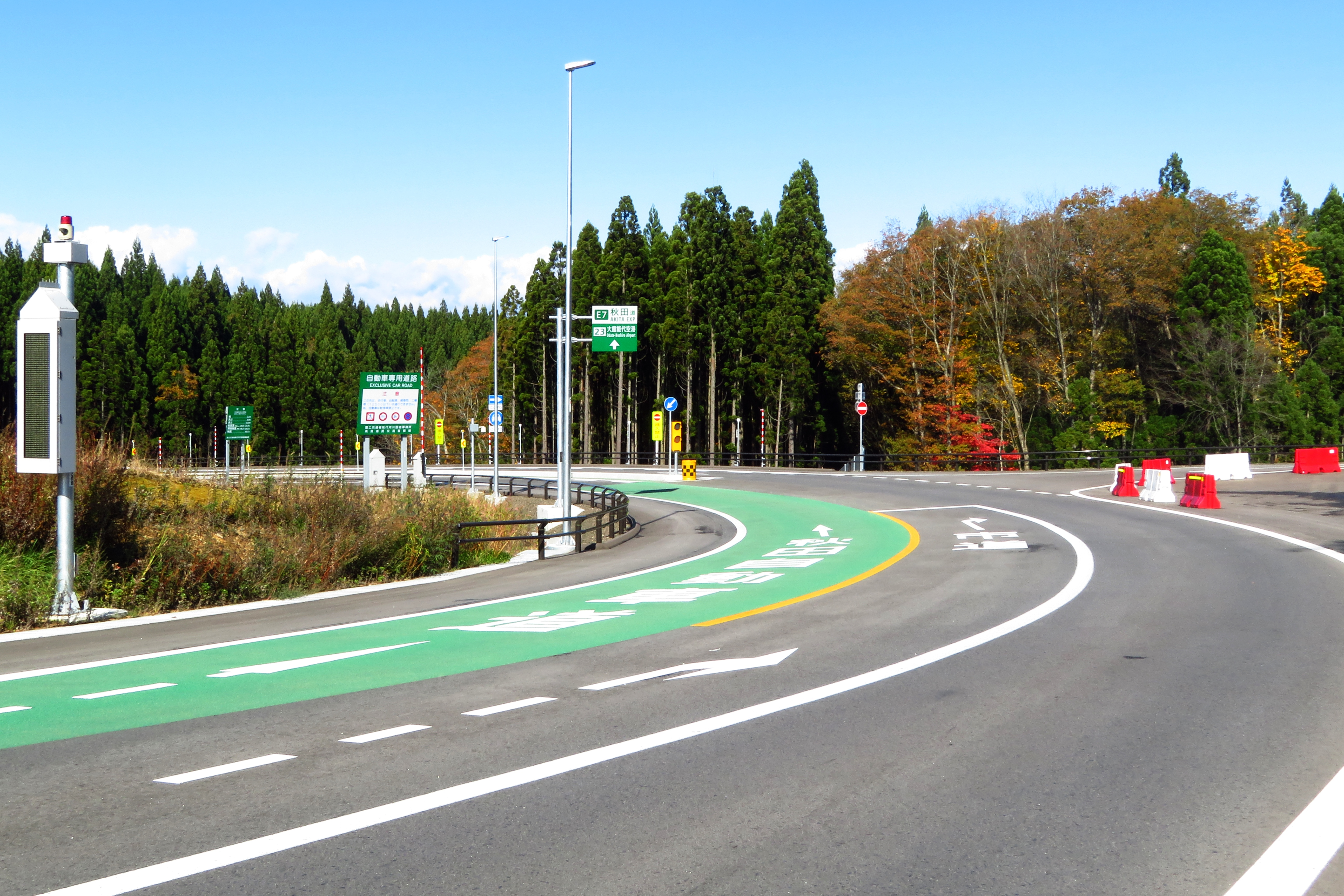 大館能代空港インターチェンジ 出入口：秋田県北秋田市 Canon PowerShot SX720 HS